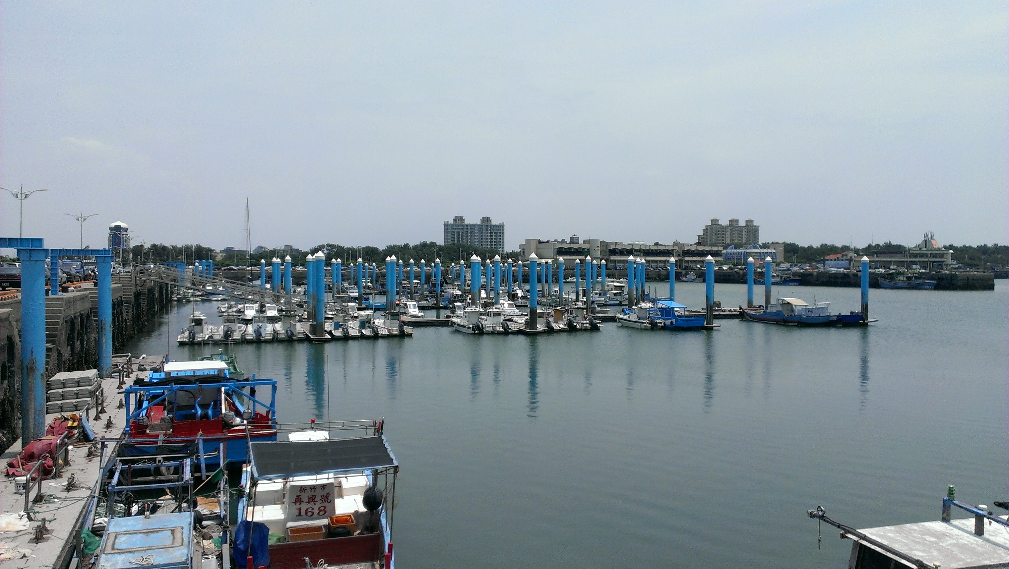 中文（台灣）: 新竹漁港碼頭區